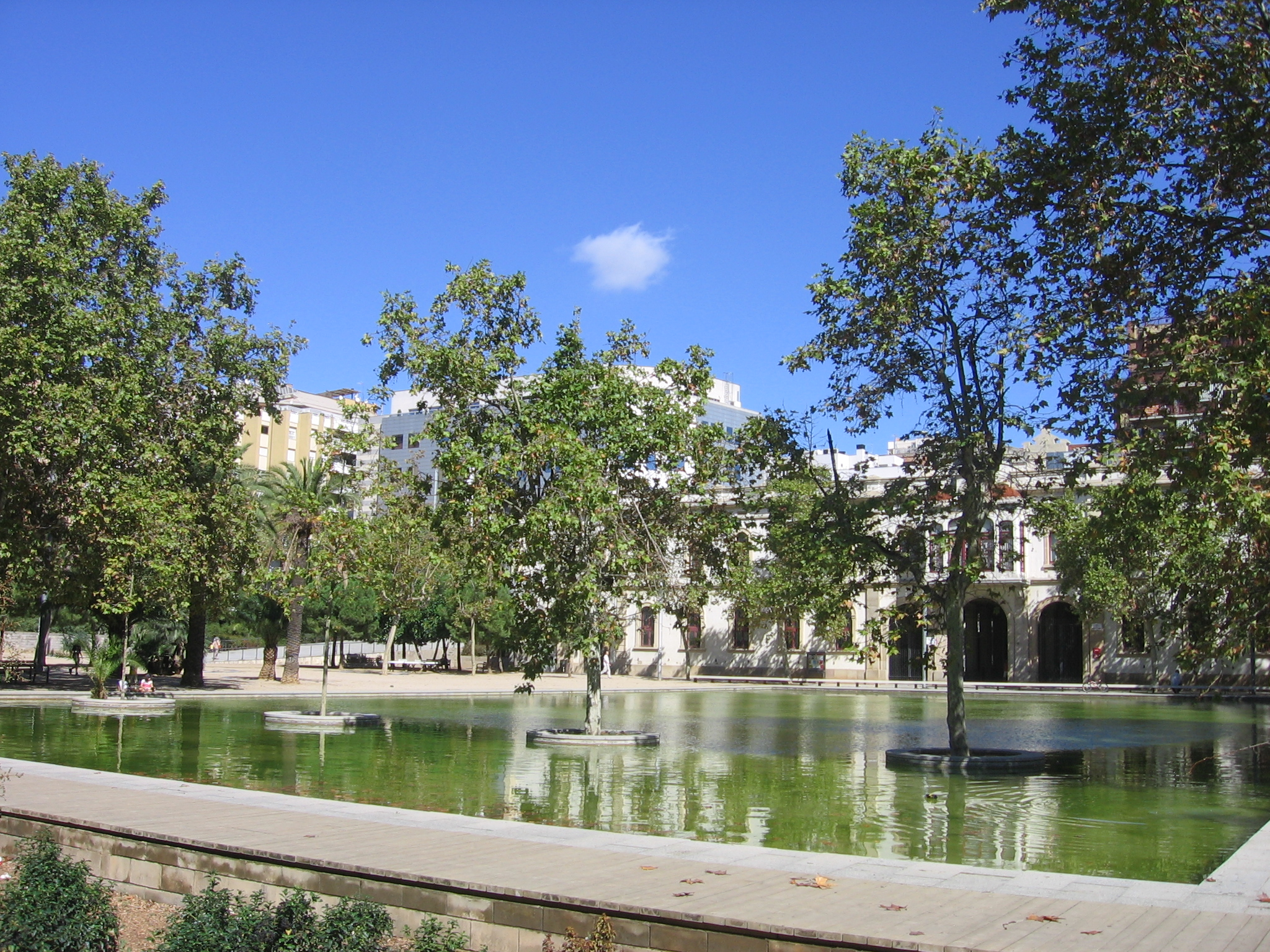 Jardines del Príncipe de Gerona.